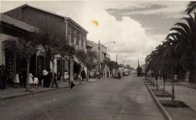 foto del centro de Ovalle a mediados de siglo XX